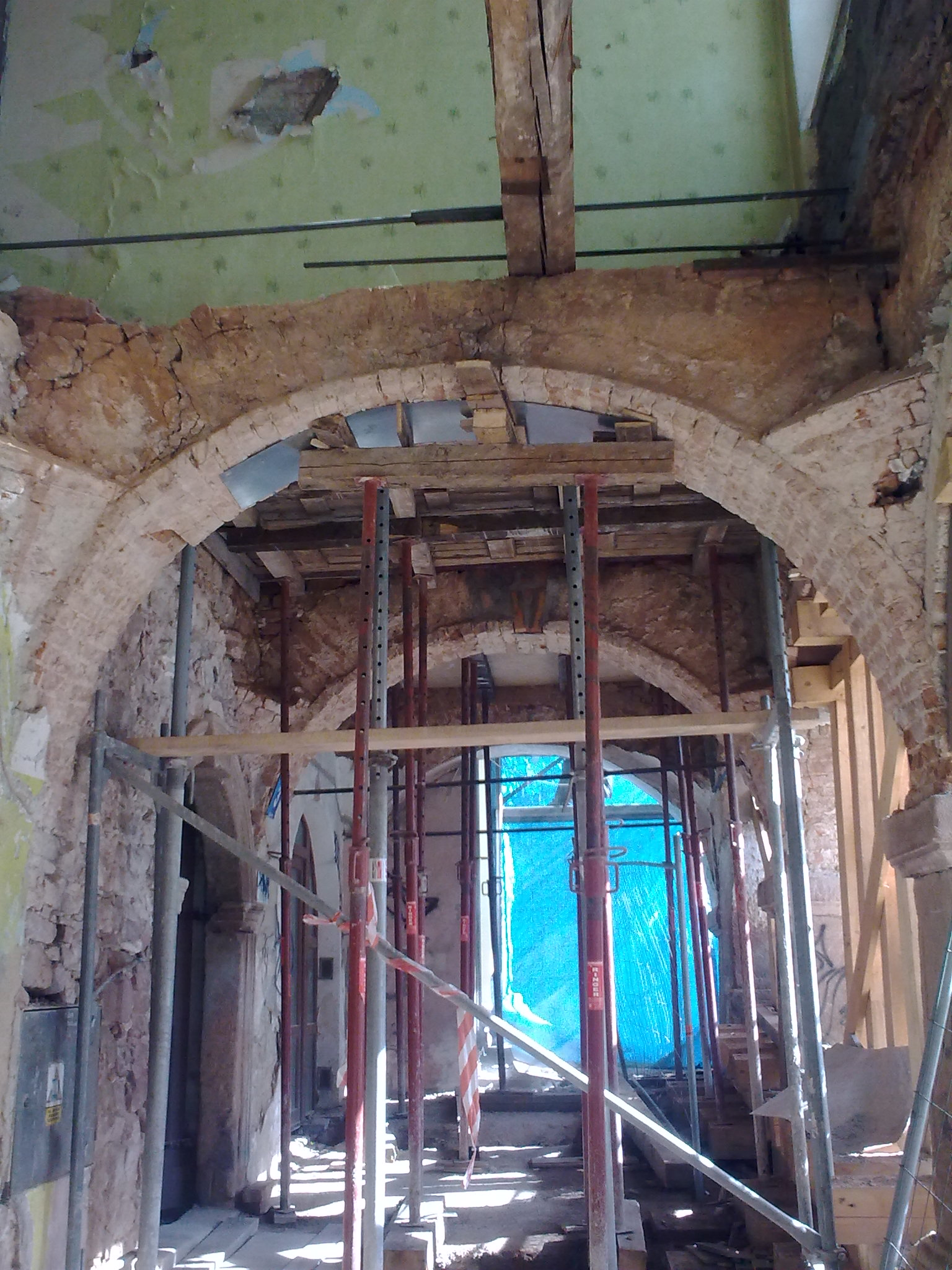 Nowa Ruda, Rynek 3